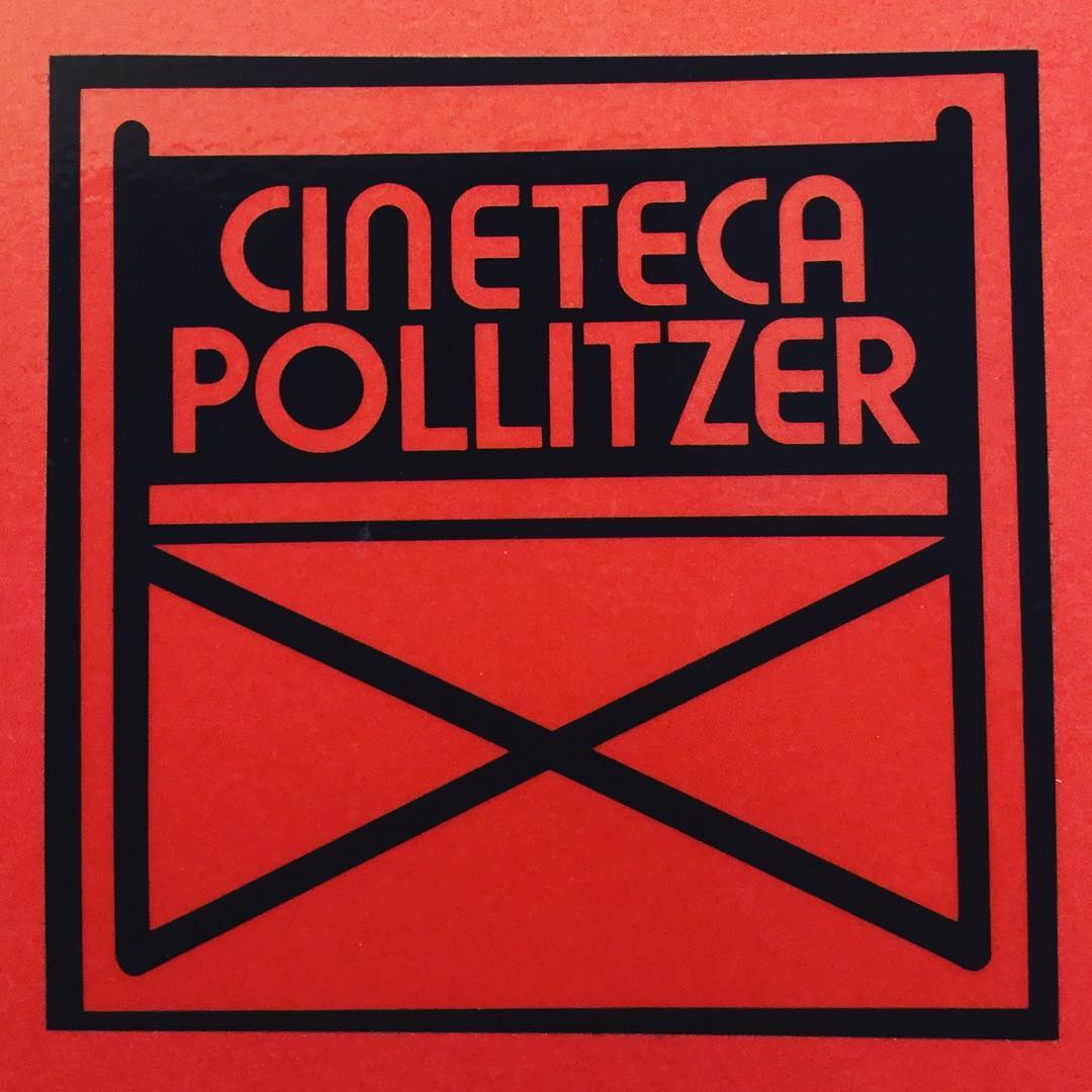 Logo della Cineteca Pollitzer, riprodotto da materiale didattico.